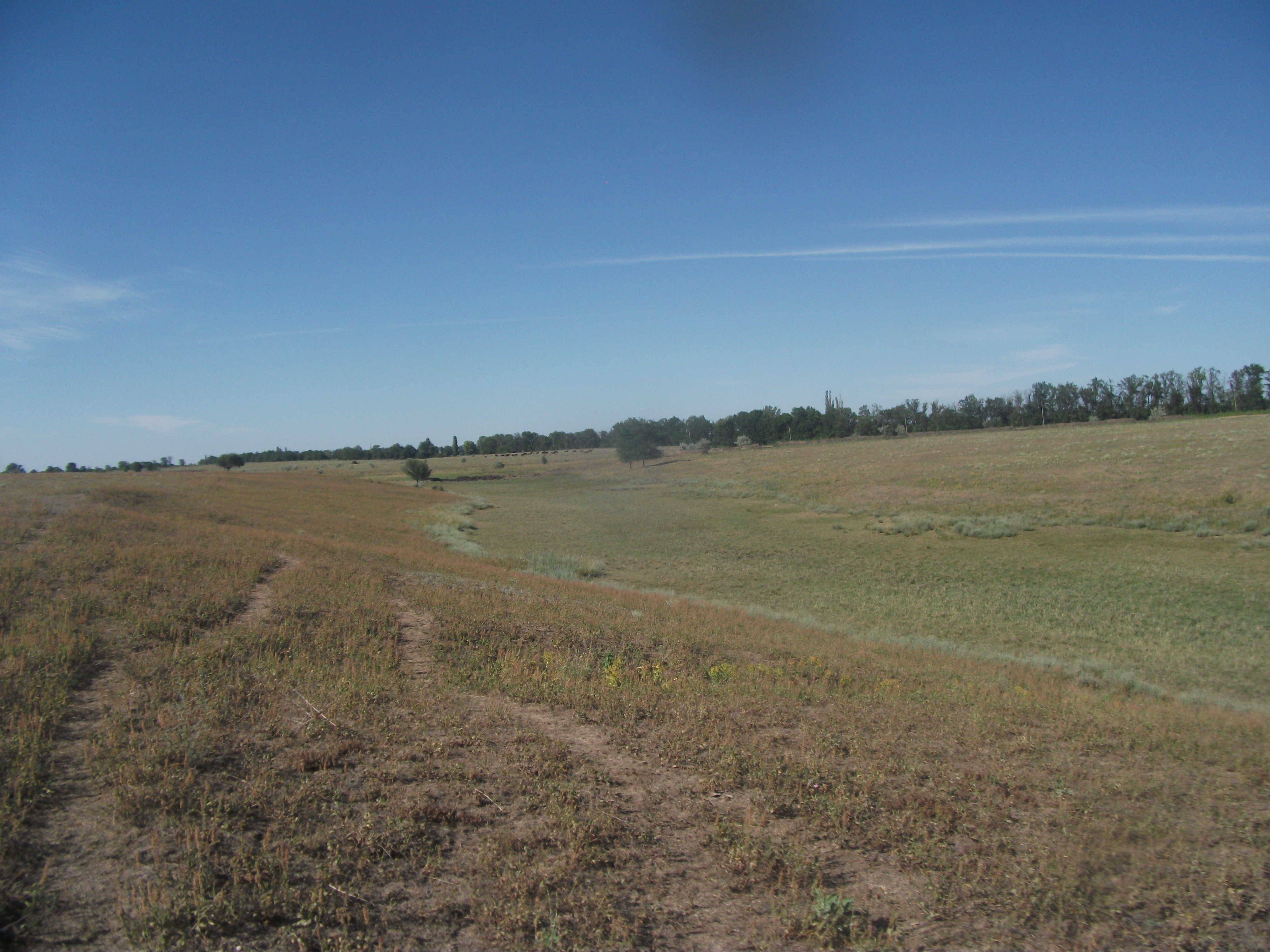 Балка Широка поблизу села Широке